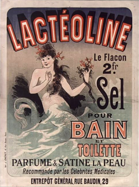 Affiche de 1881 pour un sel de bain réputé bon pour la peau (selon la publicité). peinte par Chéret, Jules (1836-1932). Illustrateur. Marque du produit : Lactéoline